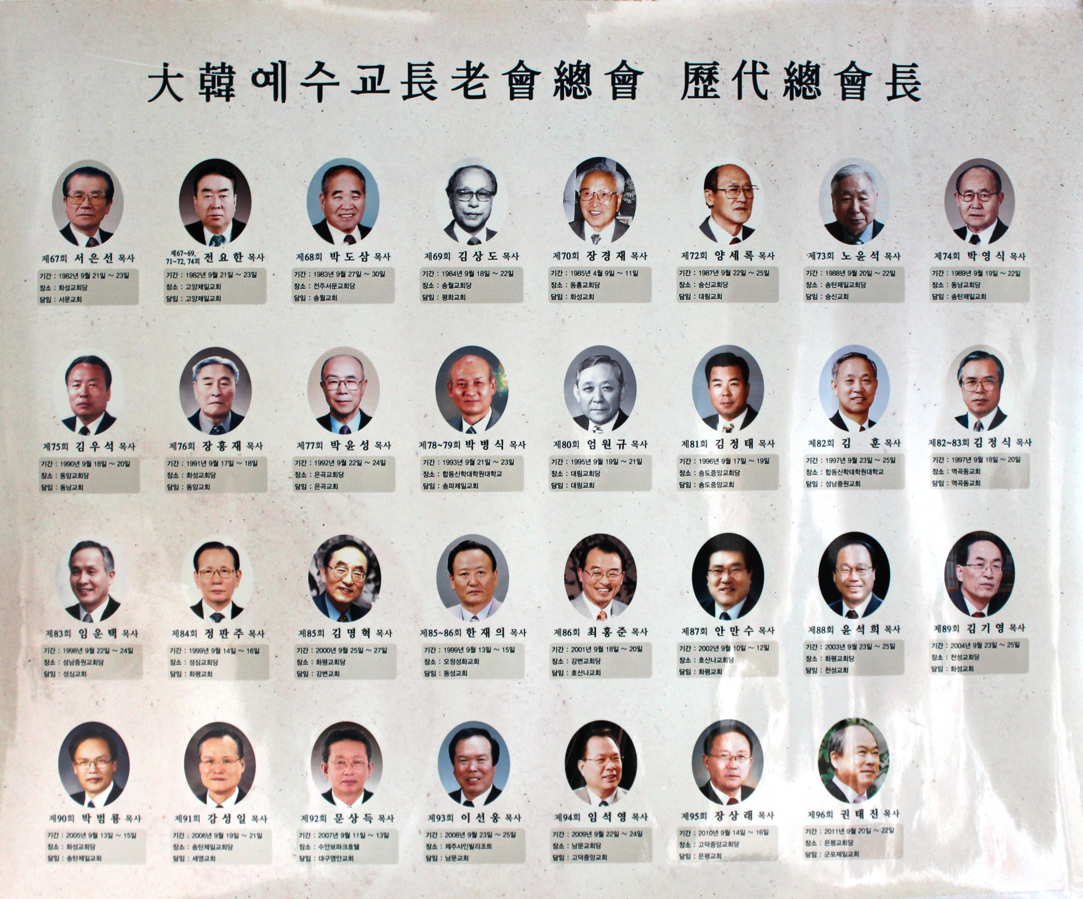 대한예수교장로회(합동) 역대총회장